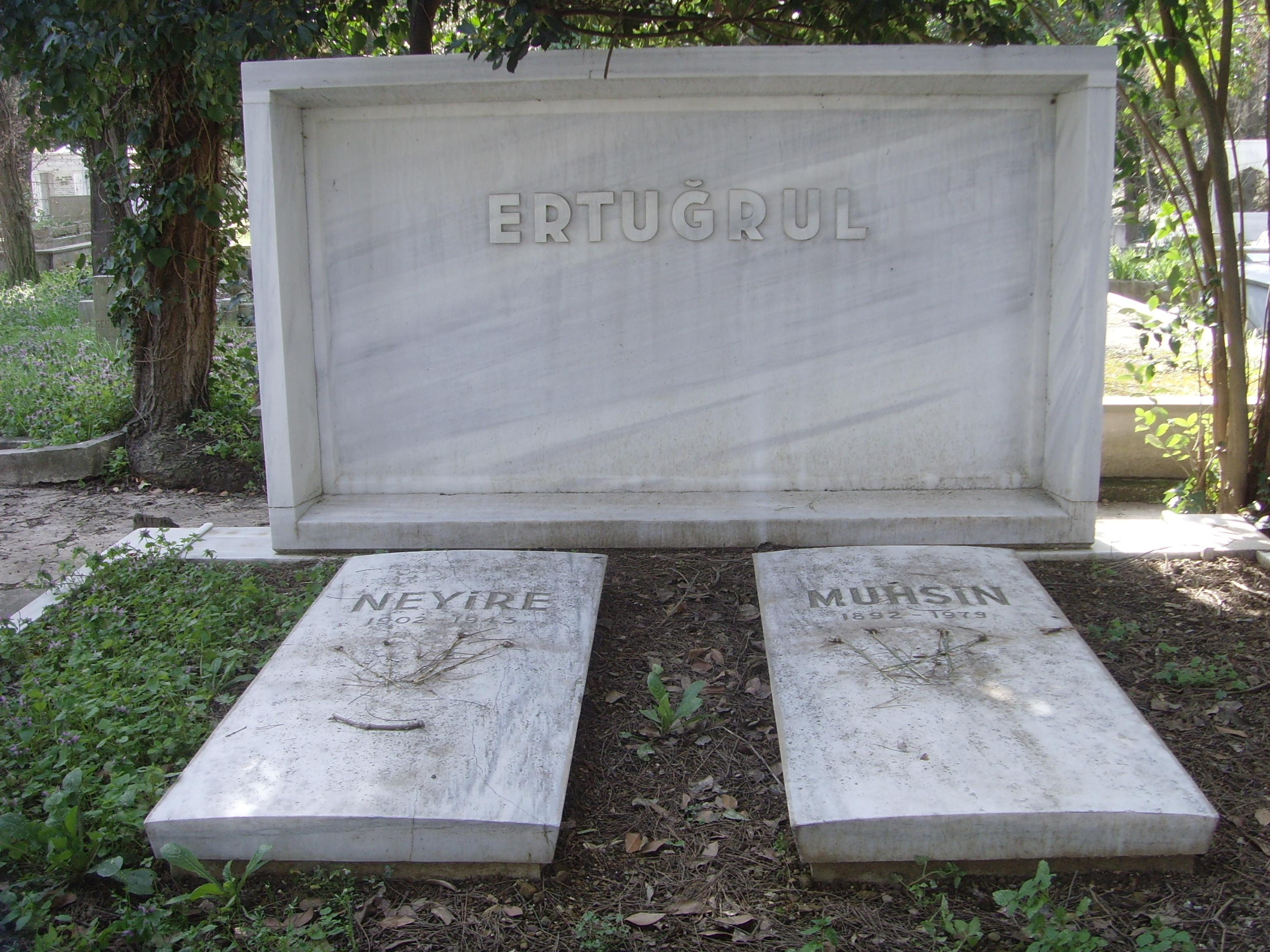 Muhsin Ertuğrul'un Zincirlikuyu Mezarlığı'ndaki mezarı